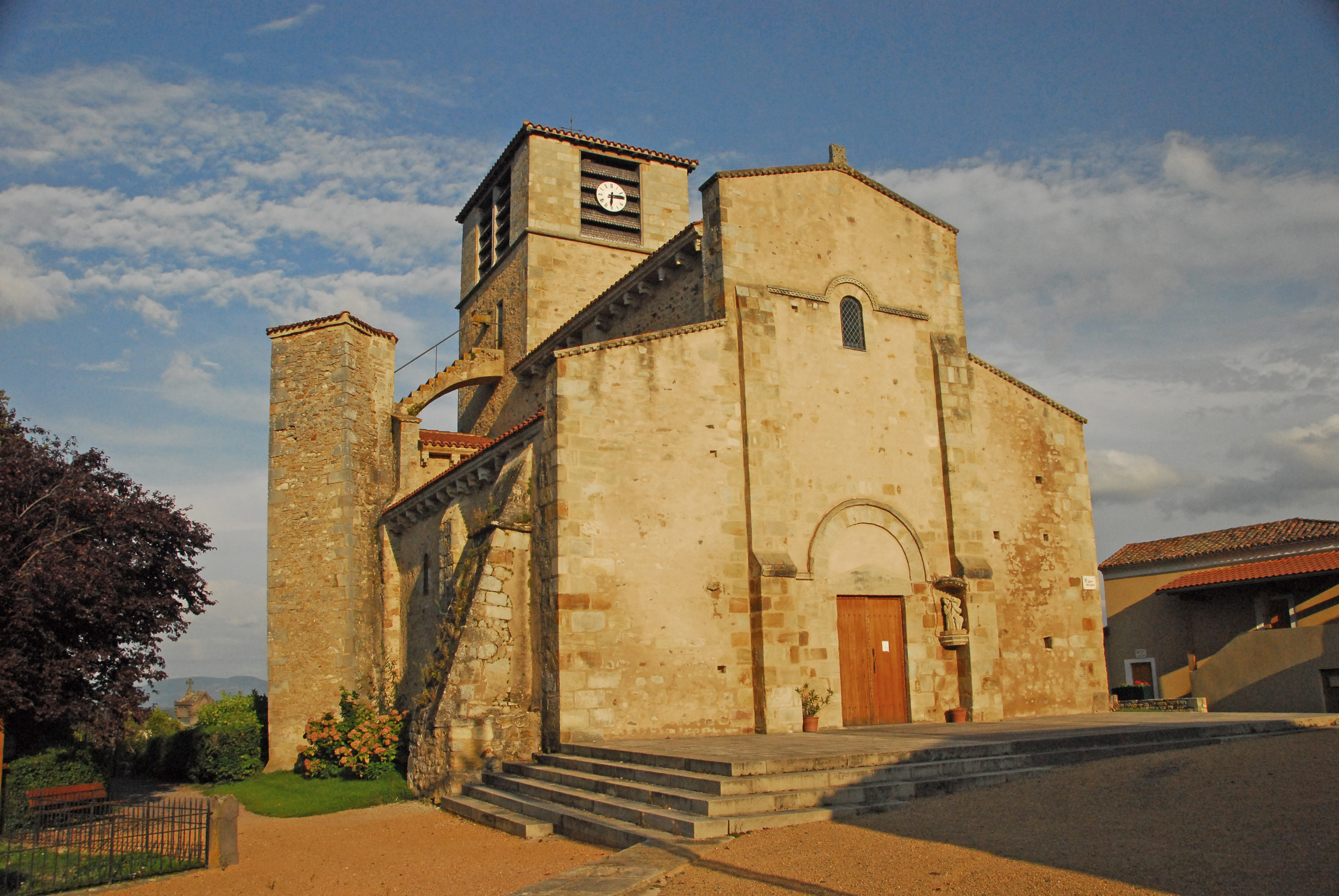 St.-Jean Glaine-Montaigut, von NW